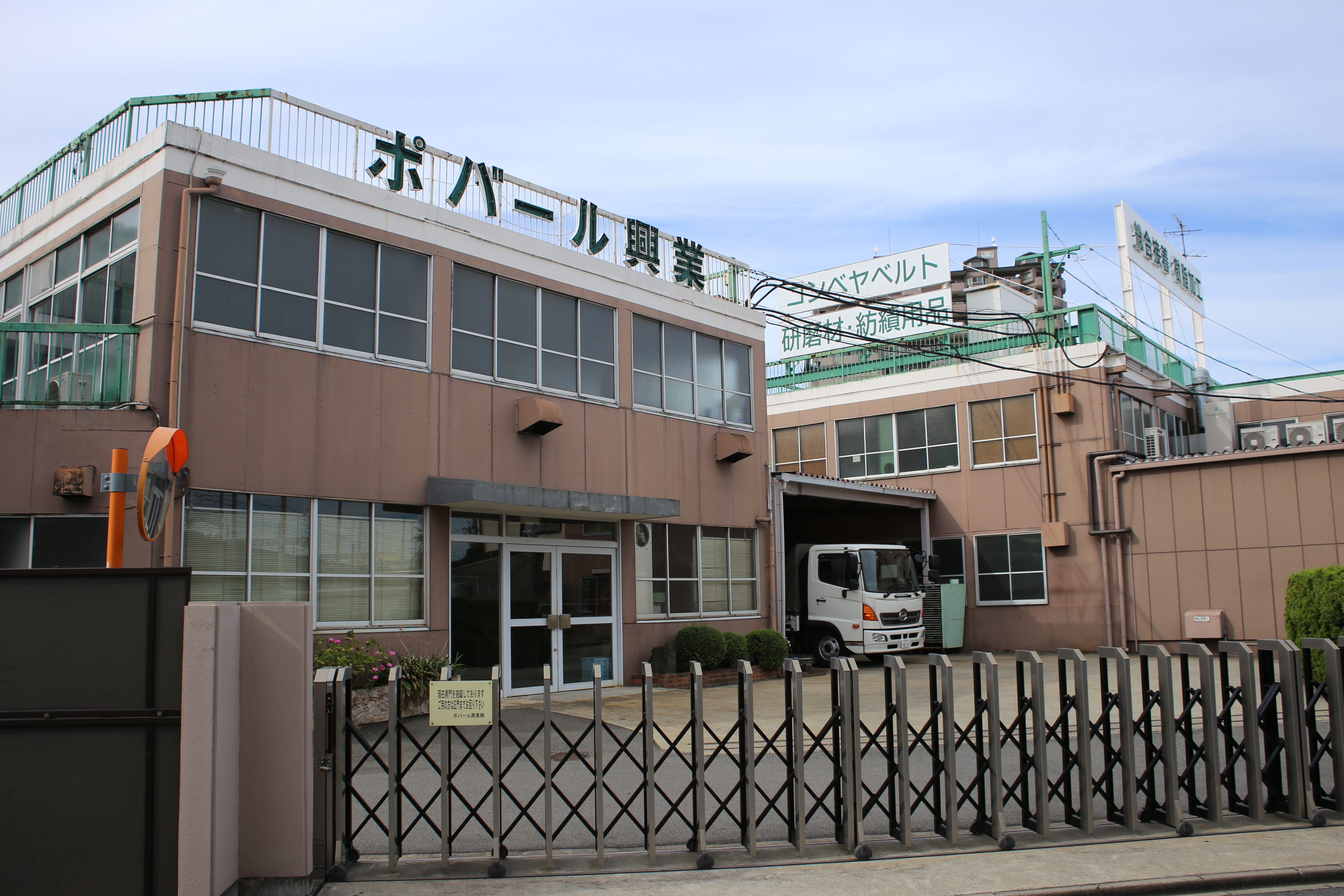 名古屋市中村区野田町のポバール興業本社を南側公道より撮影